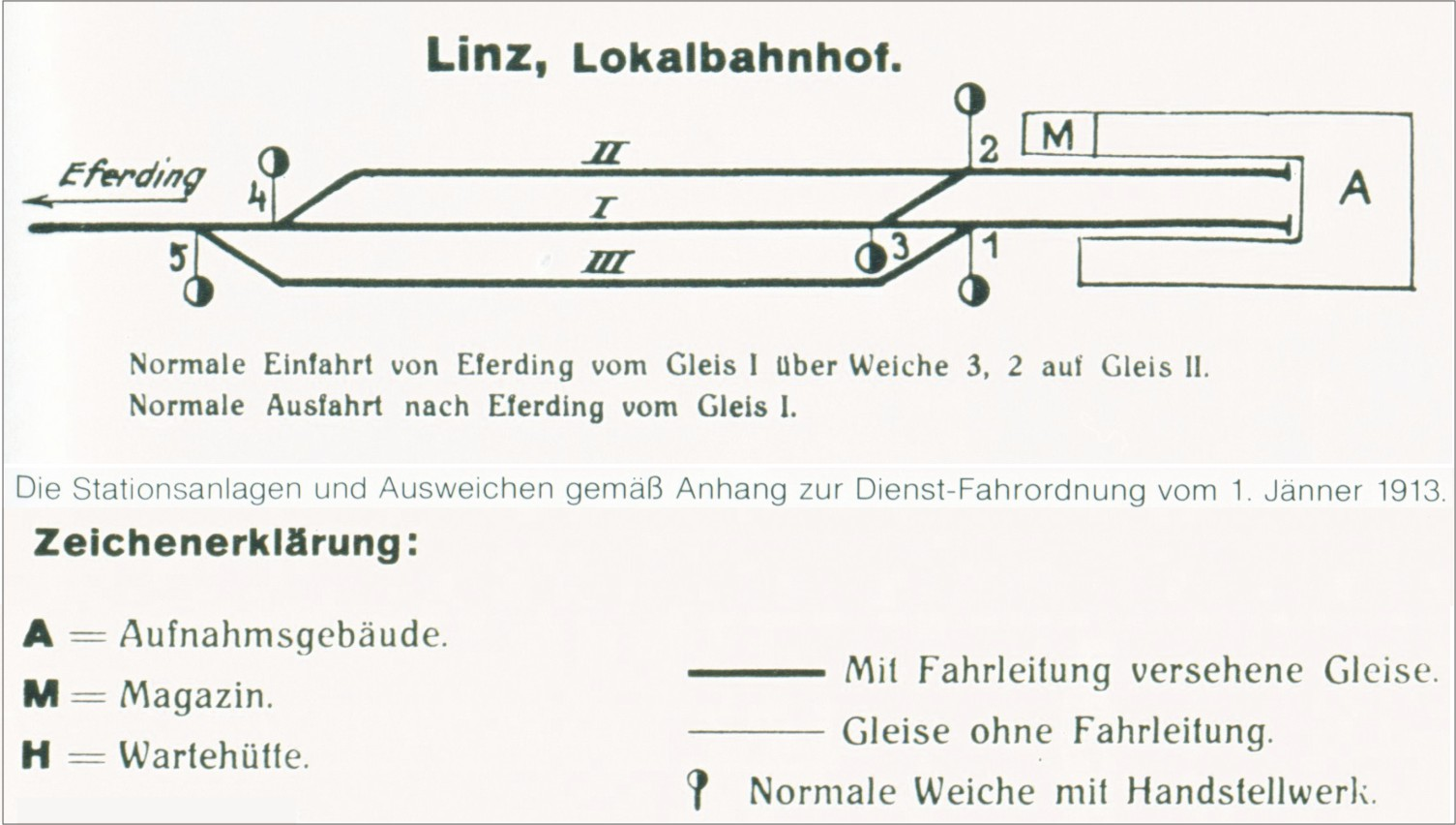 Gleisplan vom ehemaligen Linzer Lokalbahnhof